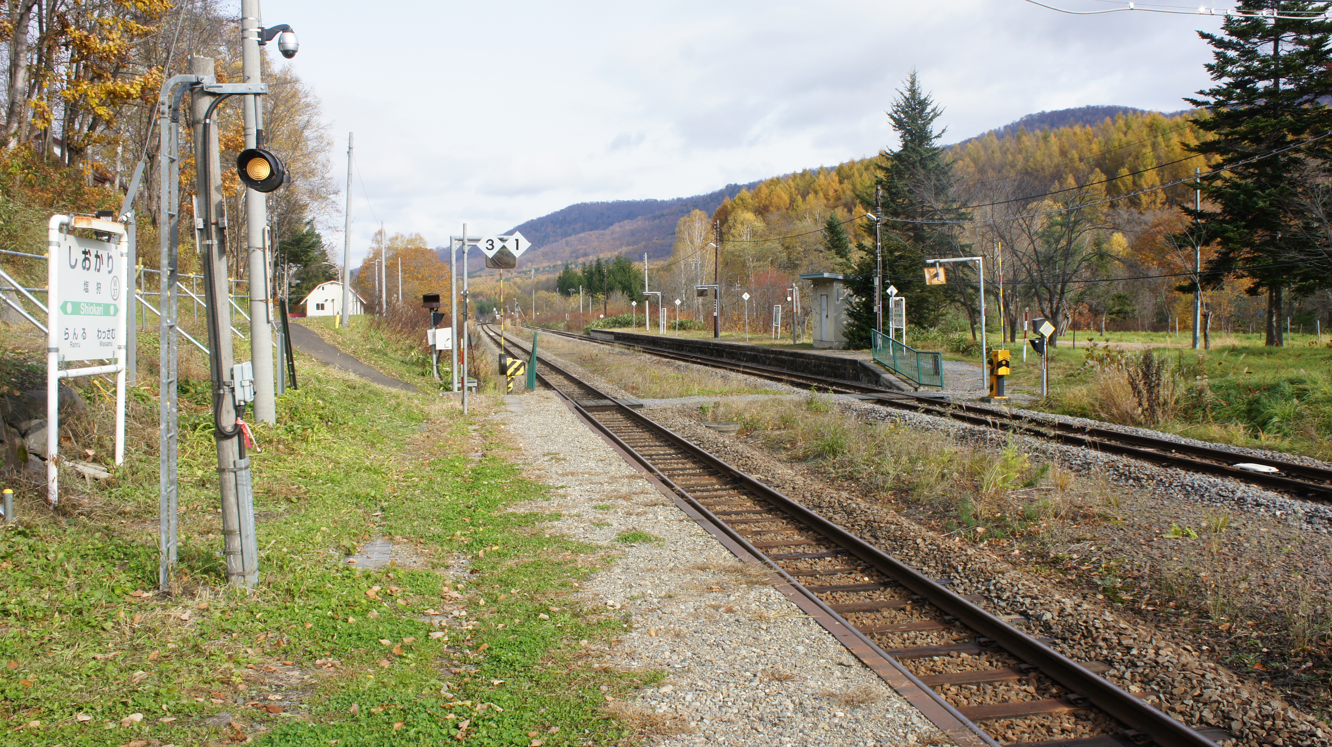 JR宗谷本線・塩狩駅のホーム Sony NEX-3